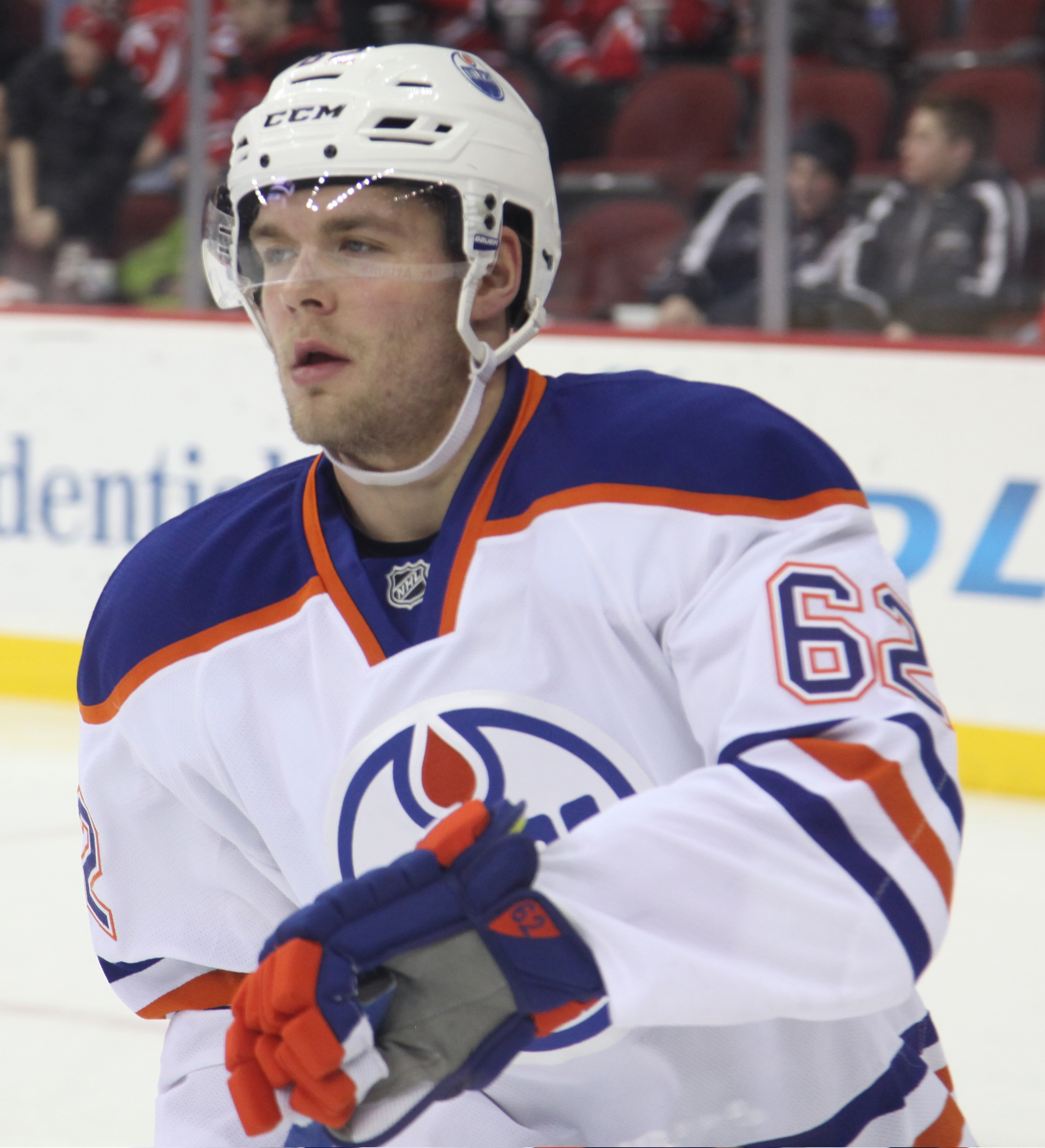 Pakarinen in February 2015